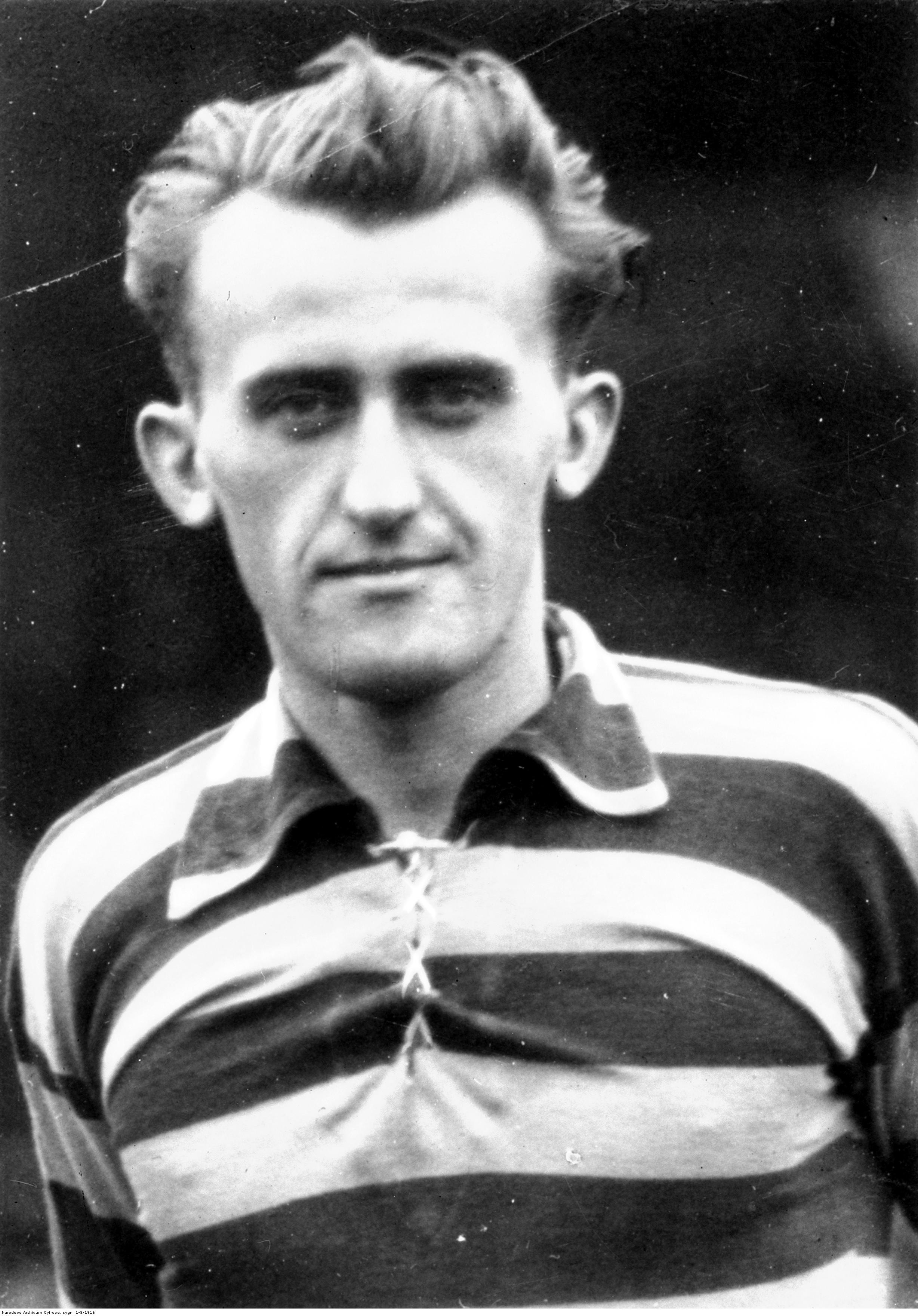 Gerard Wodarz, piłkarz klubu sportowego Ruch Wielkie Hajduki.